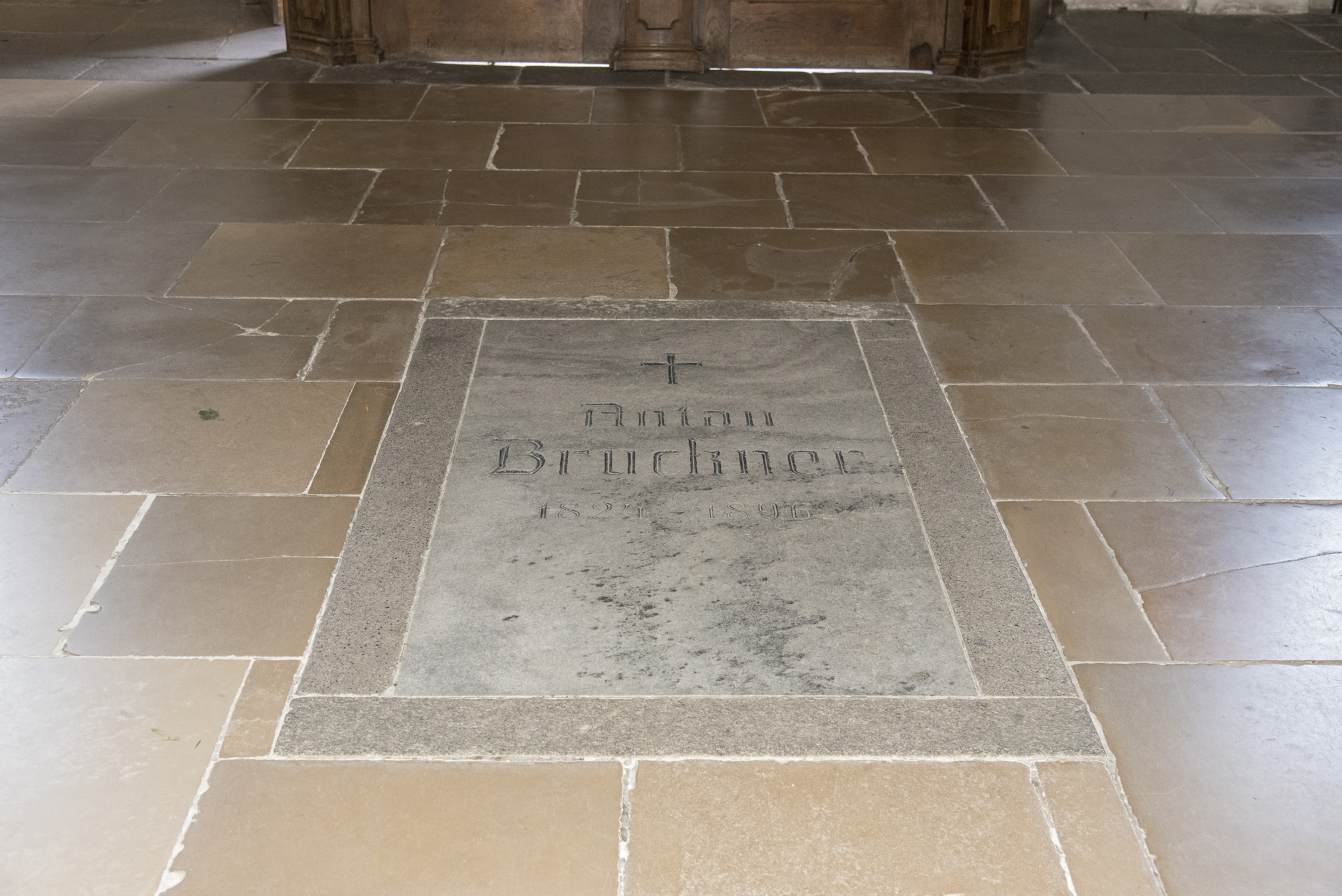 Das Grab von Anton Bruckner